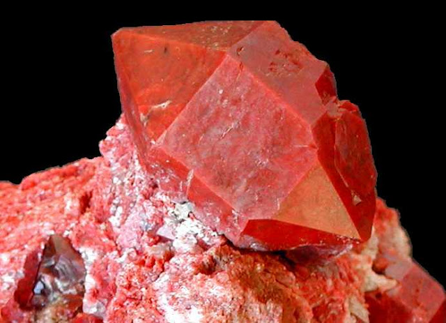 En esta imagen se observa un cristal de SiO2, específicamente de SiO2 (dióxido de silicio) con FeO (OH) (óxido de hierro) en la red cristalina, terminado en doble punta y, como es característico por su sistema cristalino, de sección exagonal.